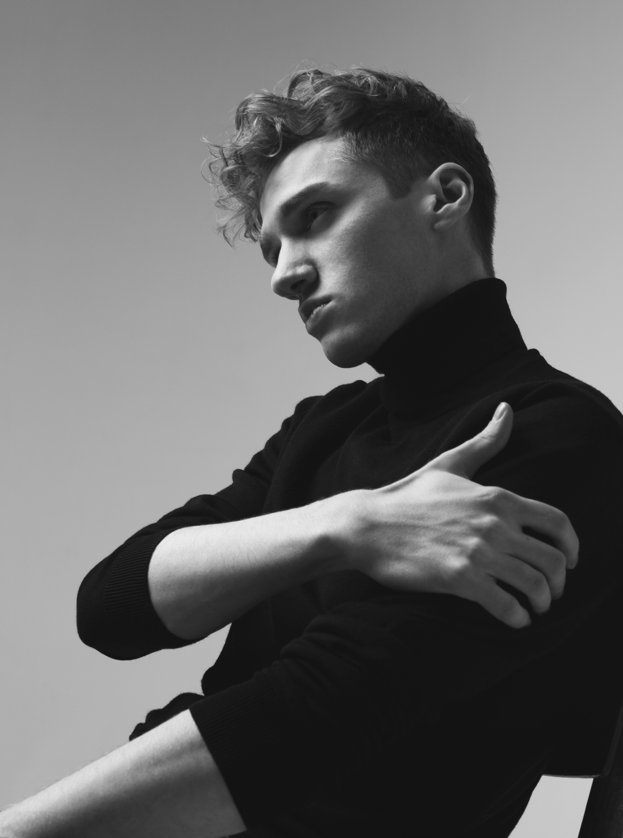 Russian composer Kirill Richter by Igor Klepnev